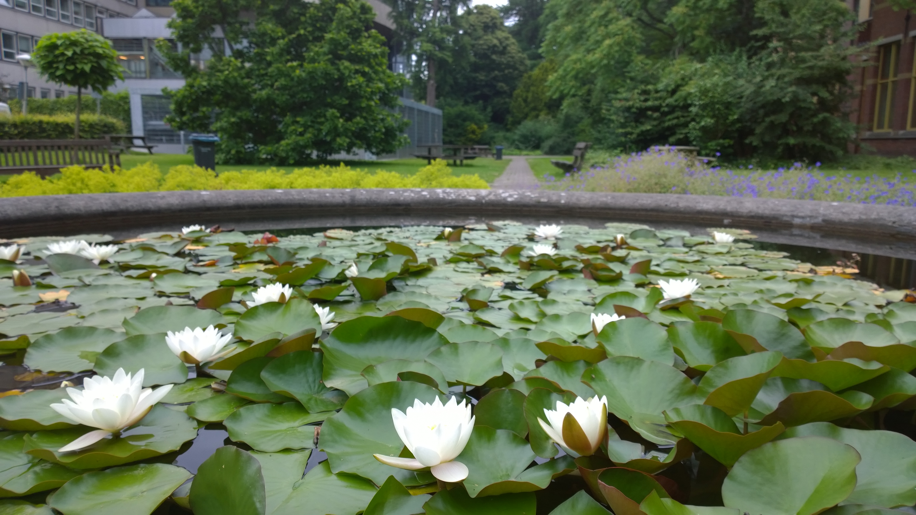 Hortustuin in Groningen vanaf de vijver